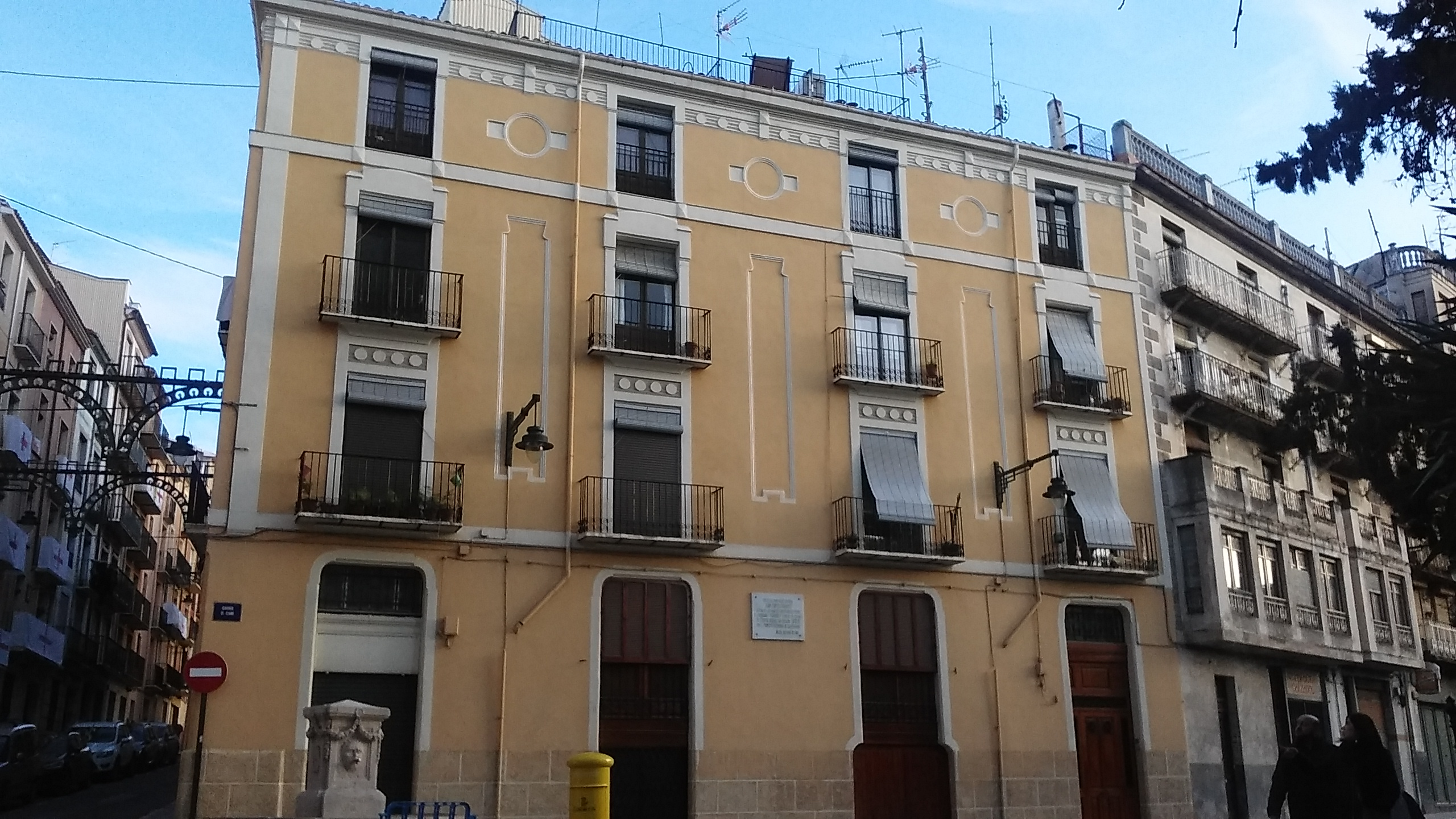 Edifici en carrer El Cami número 1 d'Alcoy. Obra de Timoteo Briet Montaud.